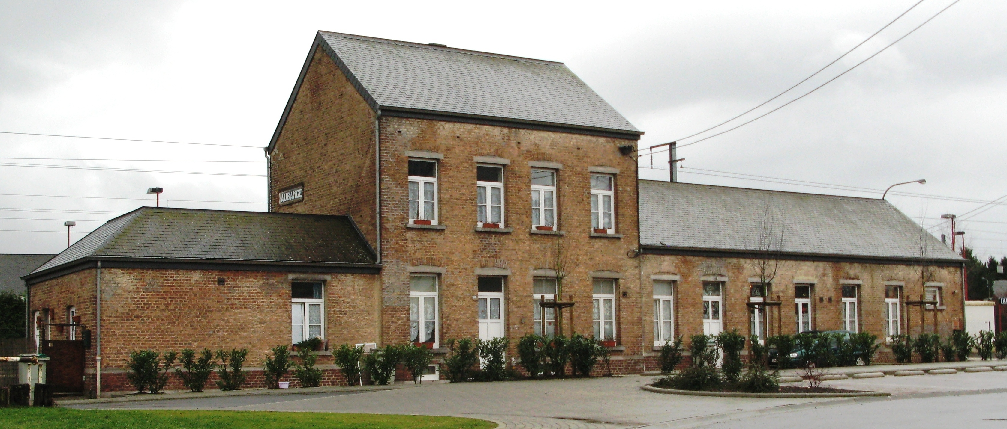 Gare Éibeng (Belsch) vum Parking aus gesinn.